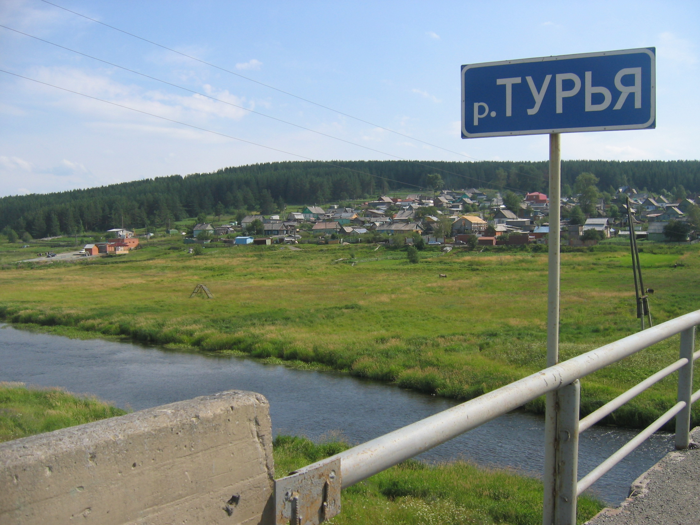 Река Турья (приток Сосьвы). Краснотурьинск, Свердловская область, Россия.